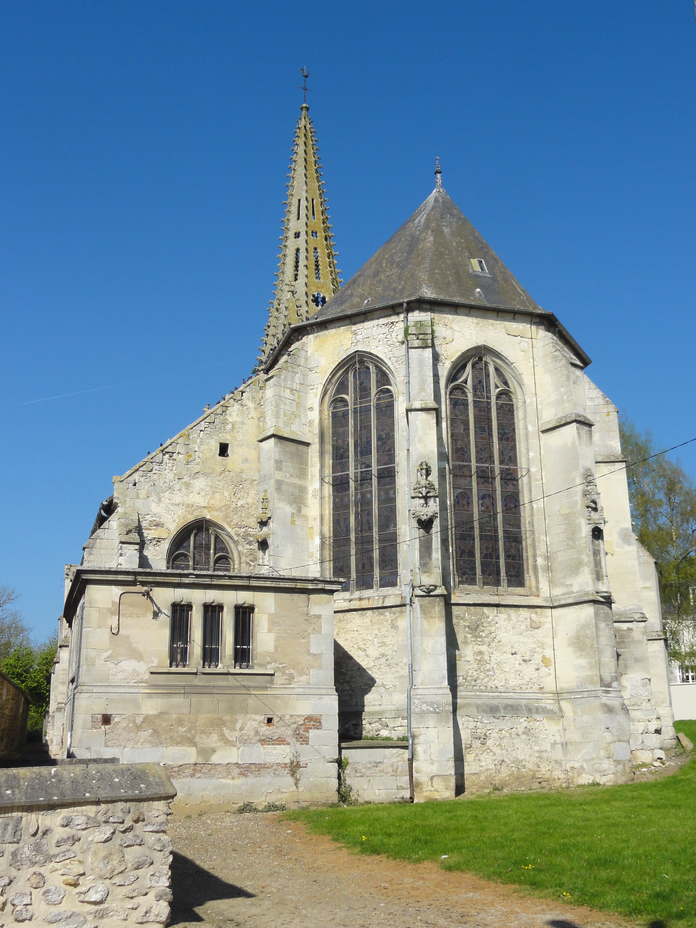 Église Notre-Dame d'Ève (voir titre).